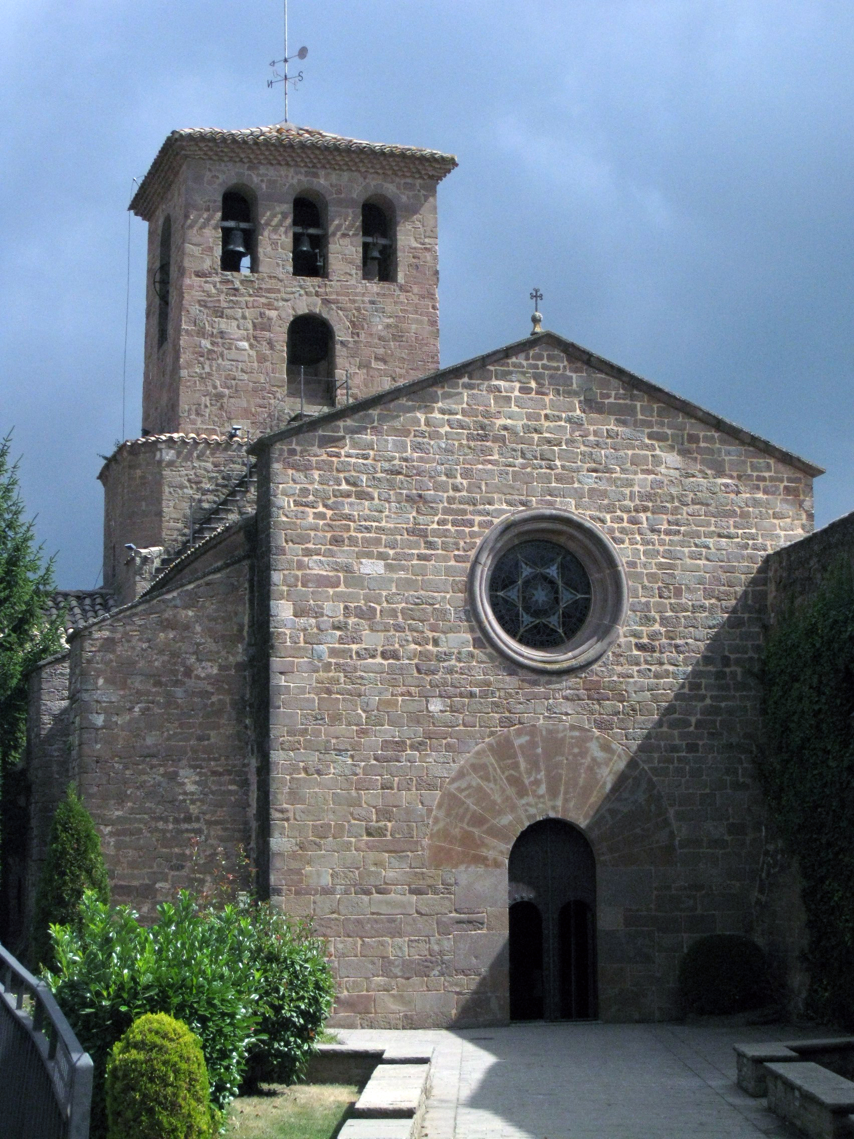 Monestir de Santa Maria (l'Estany)